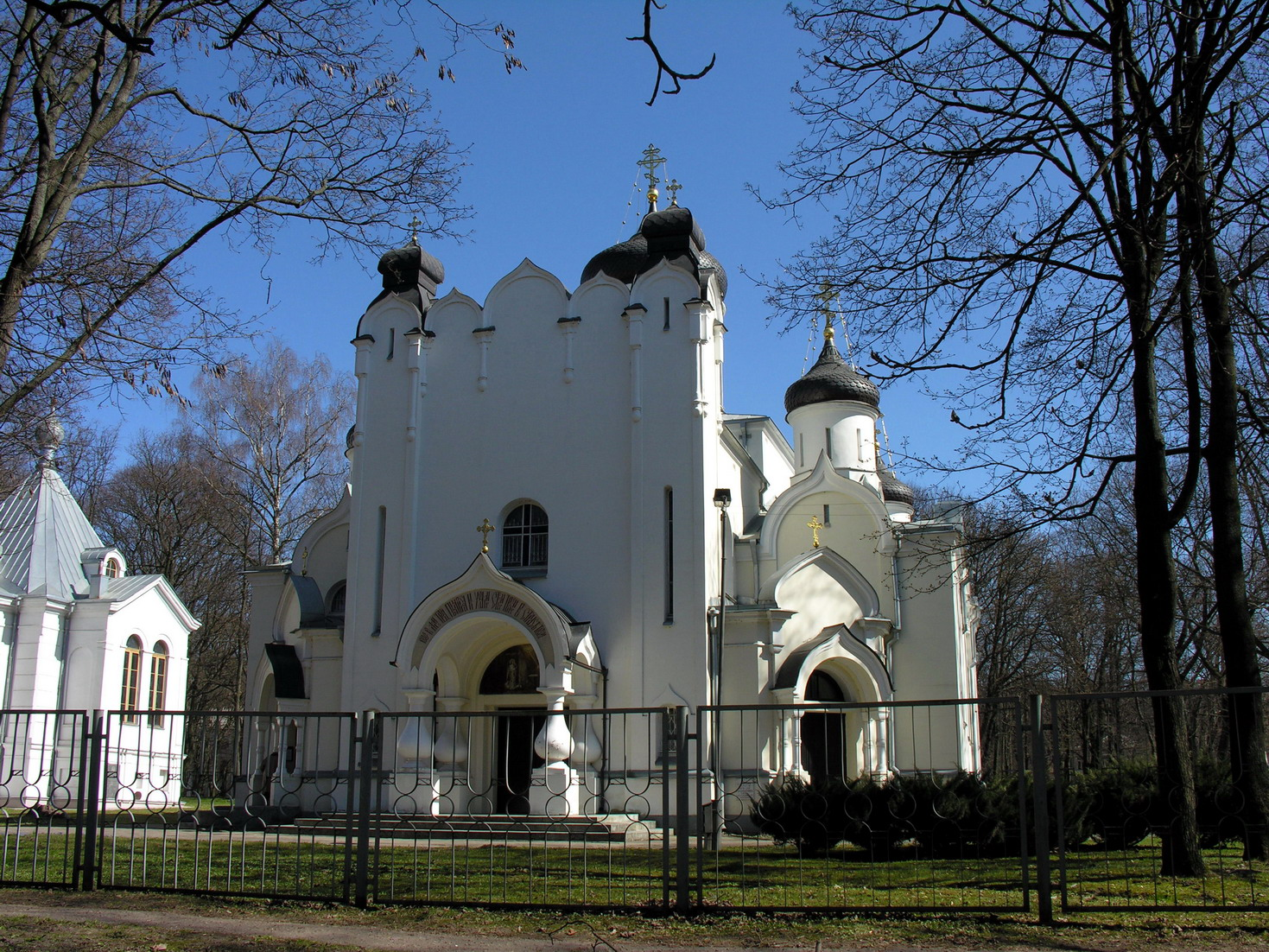 Kauno Apreiškimo Švč. Dievo Motinai soboras.